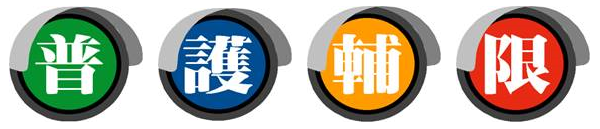 中華民國（台灣）電視分級制度標誌（2017年6月13日前）